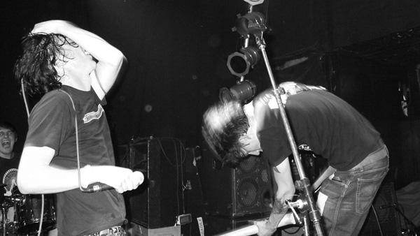 Matt Steele, , Matt Steele